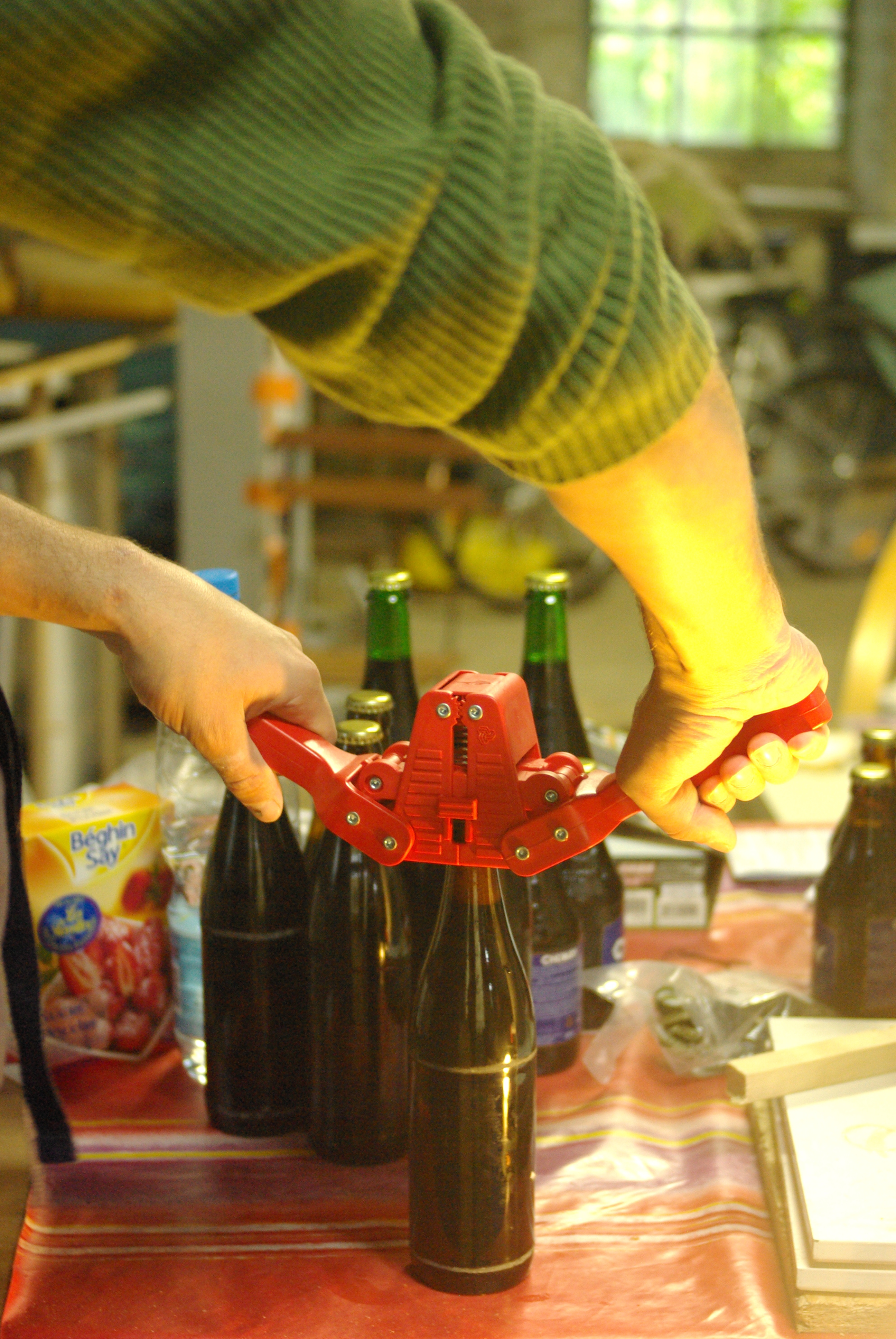 capsulage bouteille